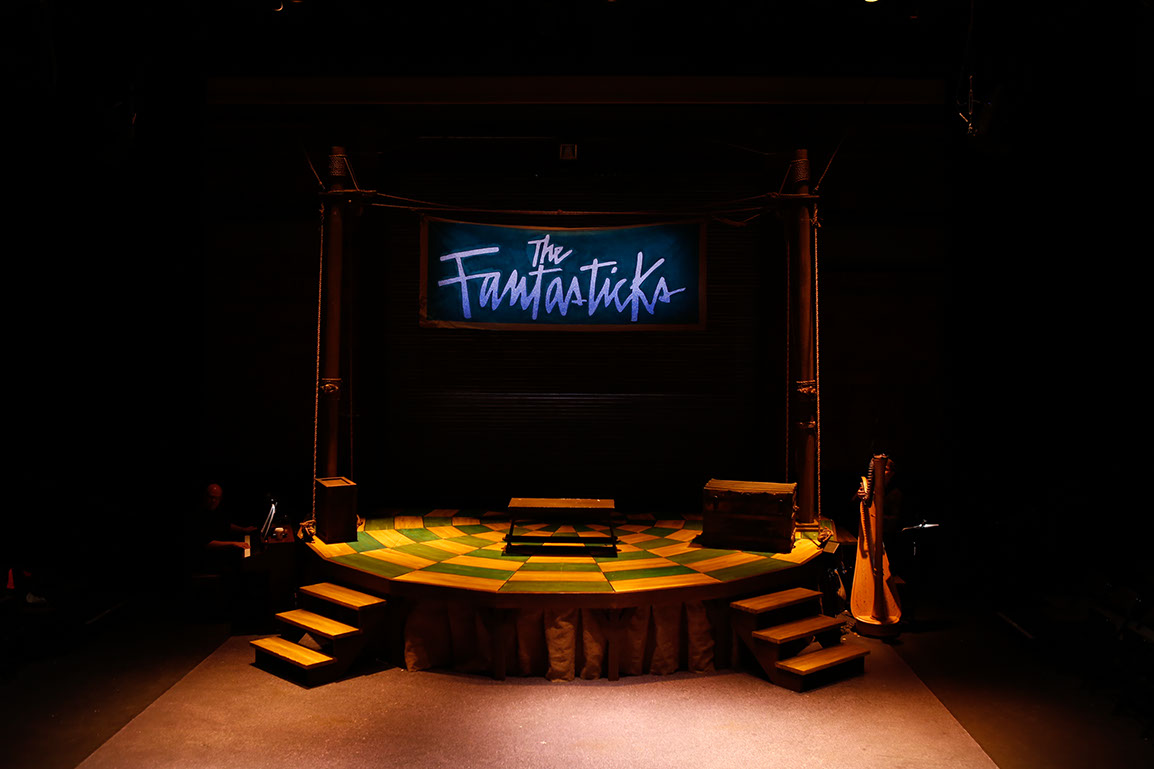 Fantasticks